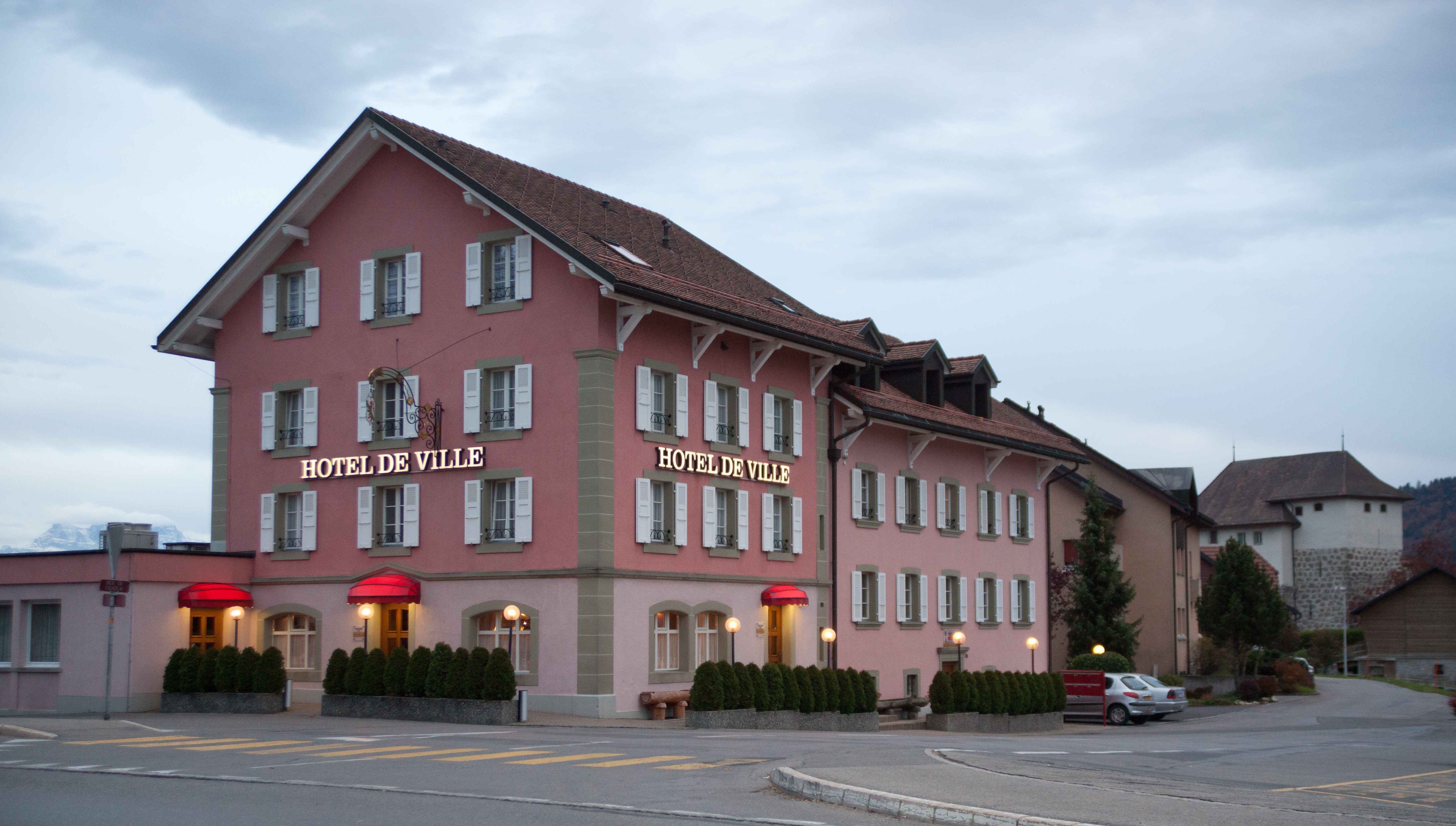 Hôtel de ville d'Attalens, canton de Fribourg, Suisse.